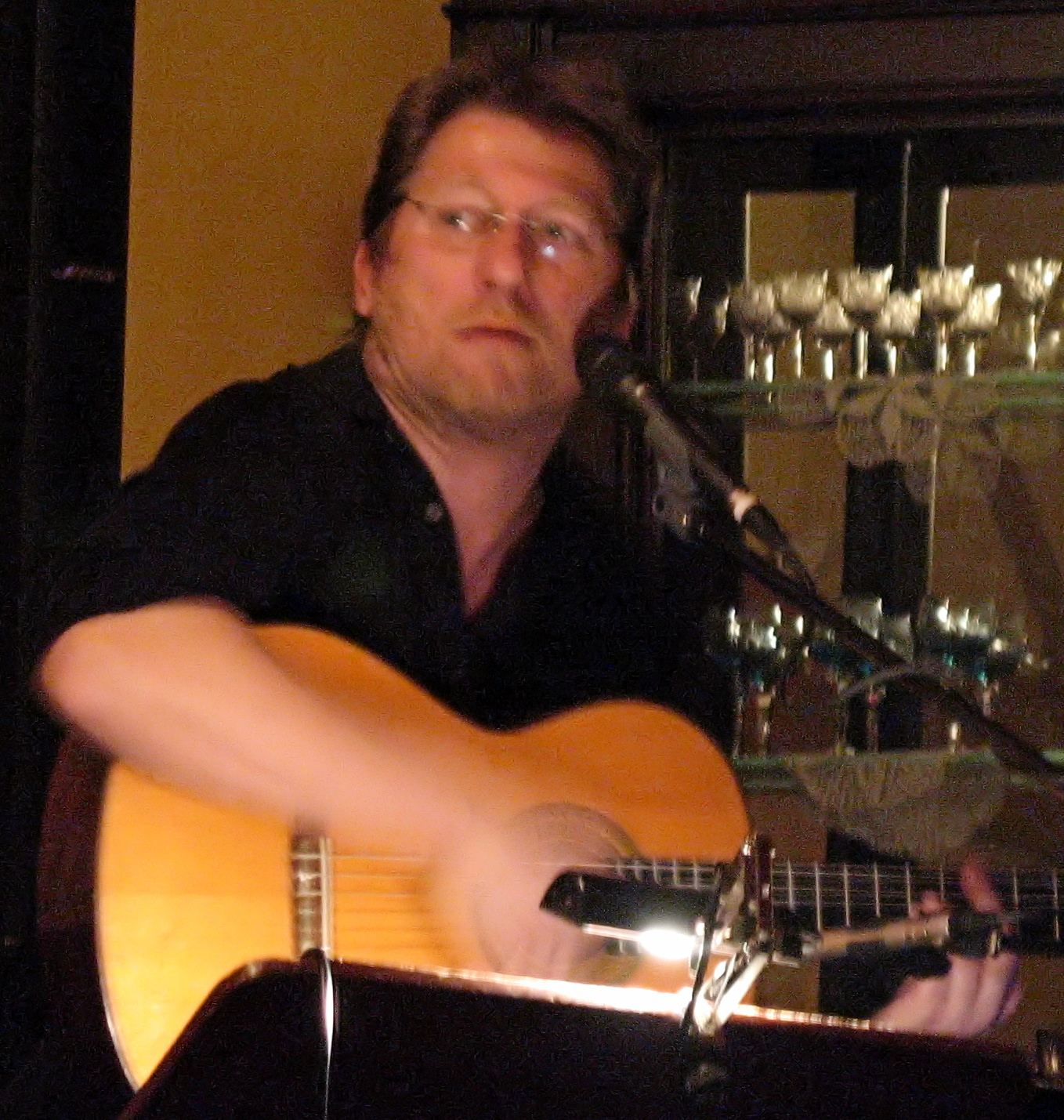 Michael Fitz im NBO-Cafe in Raisting März 2009